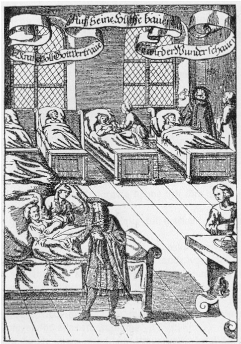 Physician seeing to the sick in a hospital. Copperplate engraving from: J. Ch. Thiemen, Haus-, Feld-, Koch-, Kunst-, etc Buch (Nürnberg 1682). - Der Kranke soll Gott vertrauen, auf seine Hülffe bauen, so wird er Wunder schauen.